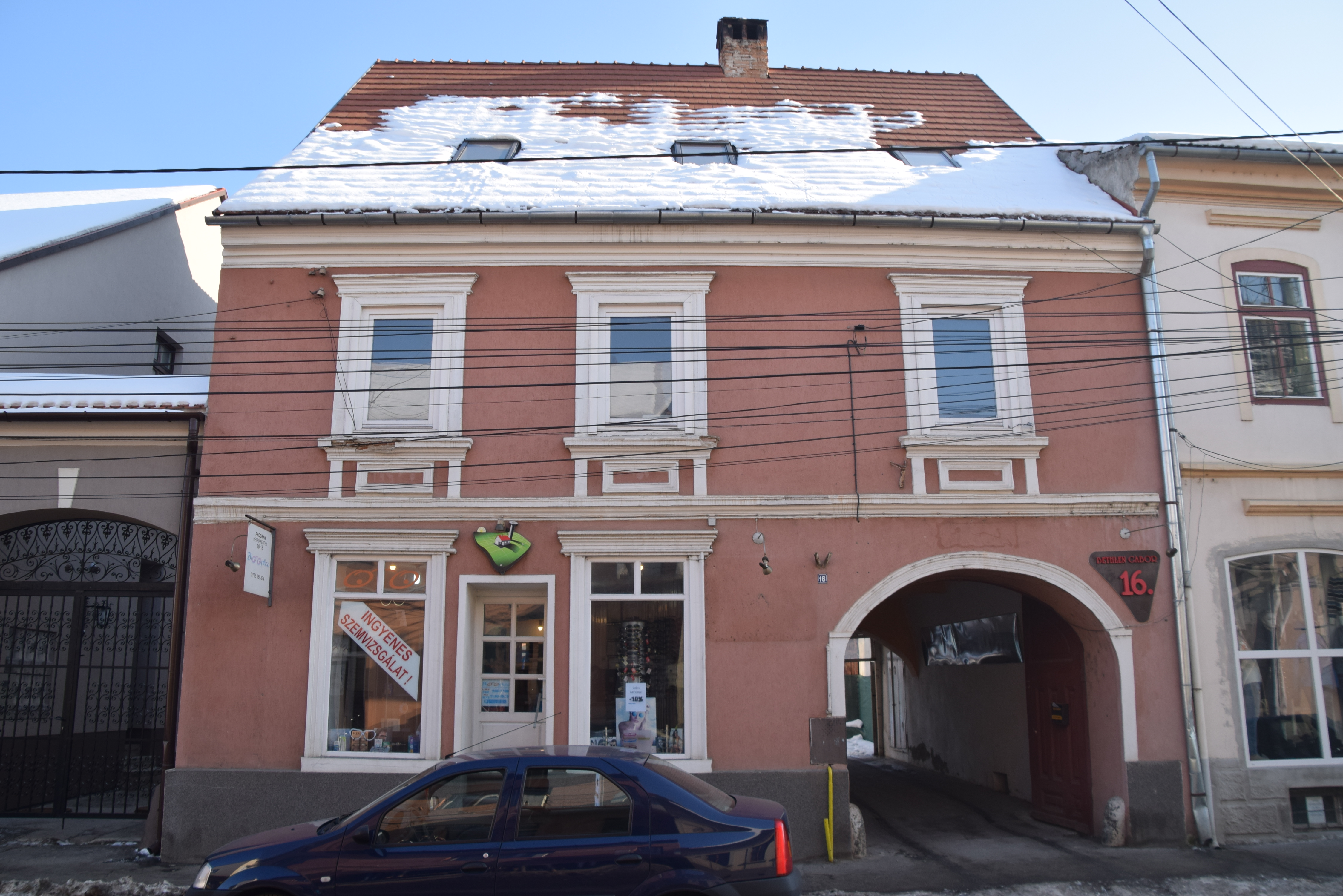 Casă (Szabó István)